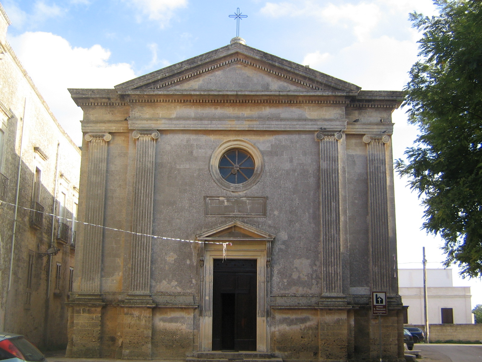 Chiesa Madre di Giuliano di Lecce